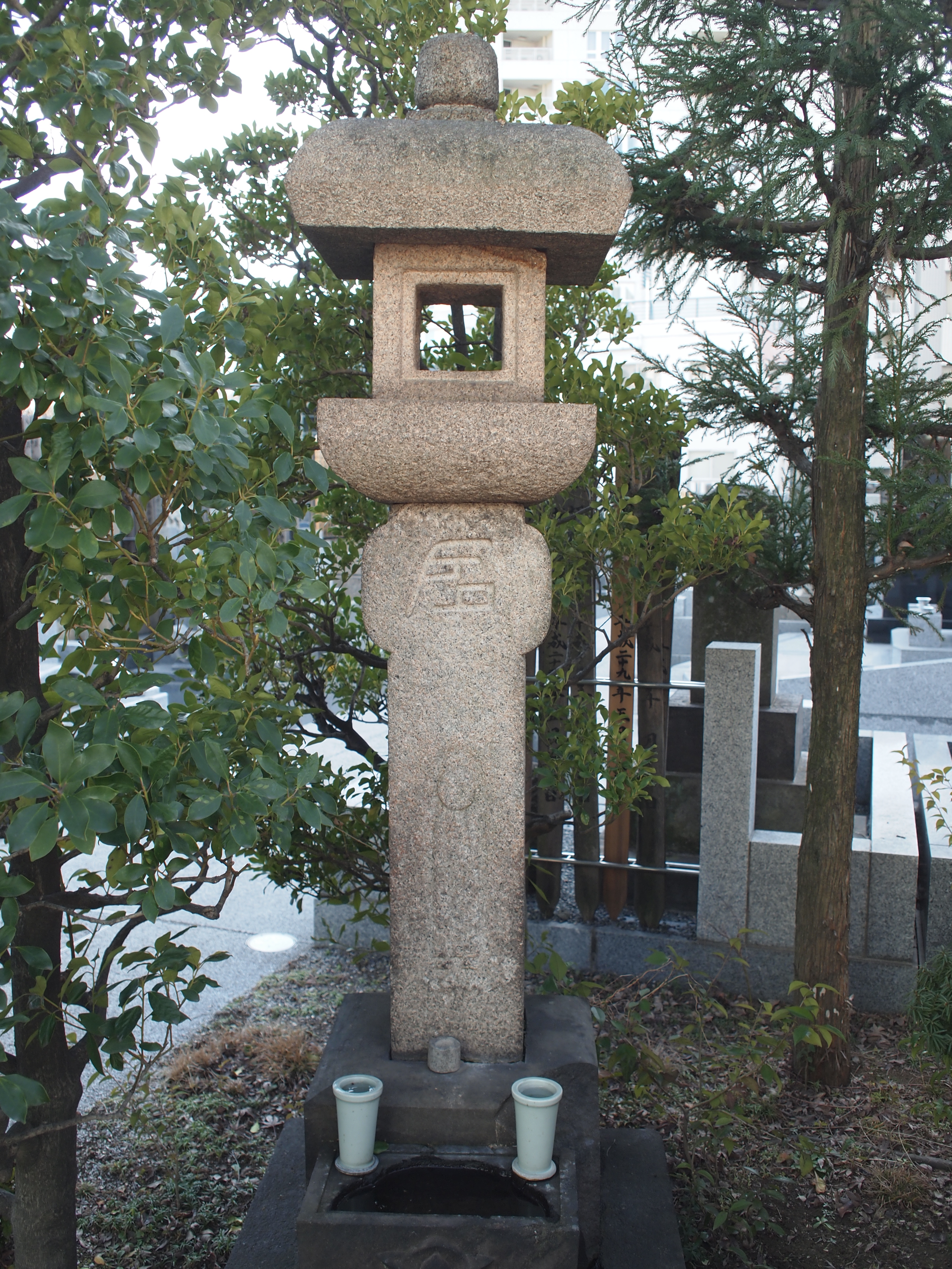 梅窓院（東京都港区）にあるキリシタン灯籠